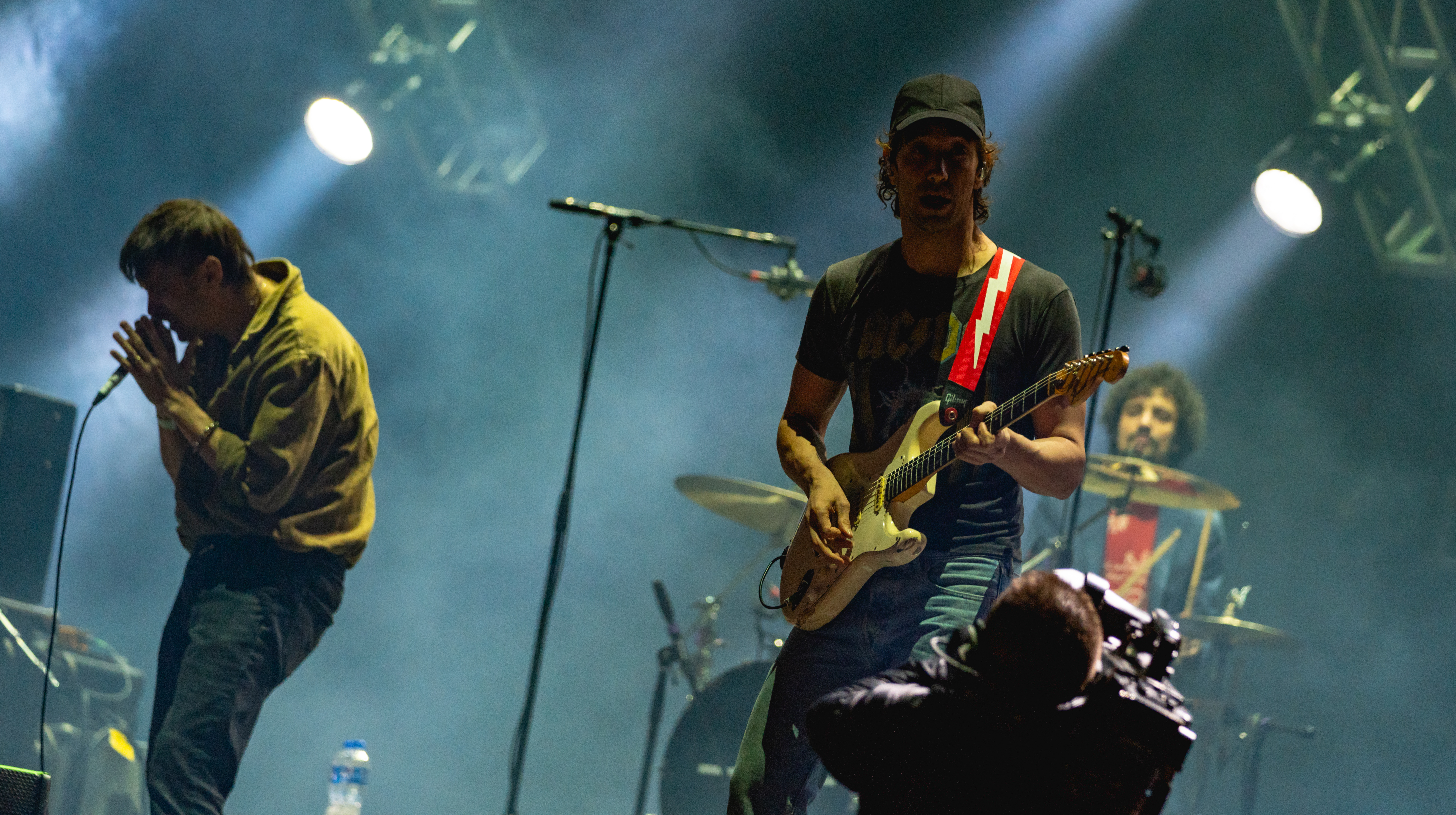 StrokesCorona161119-49